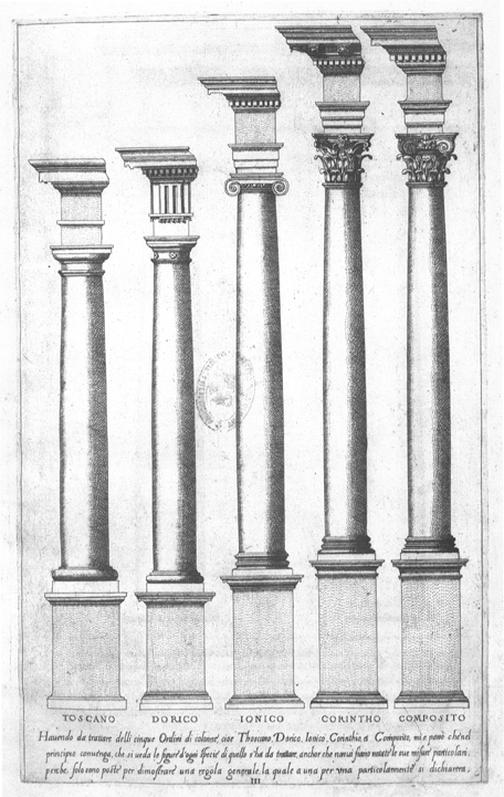 Giacomo Barozzi da Vignola, Five orders, engraving from Regole delle cinque ordini d'architettura 16th century engraving, multiple copies exist